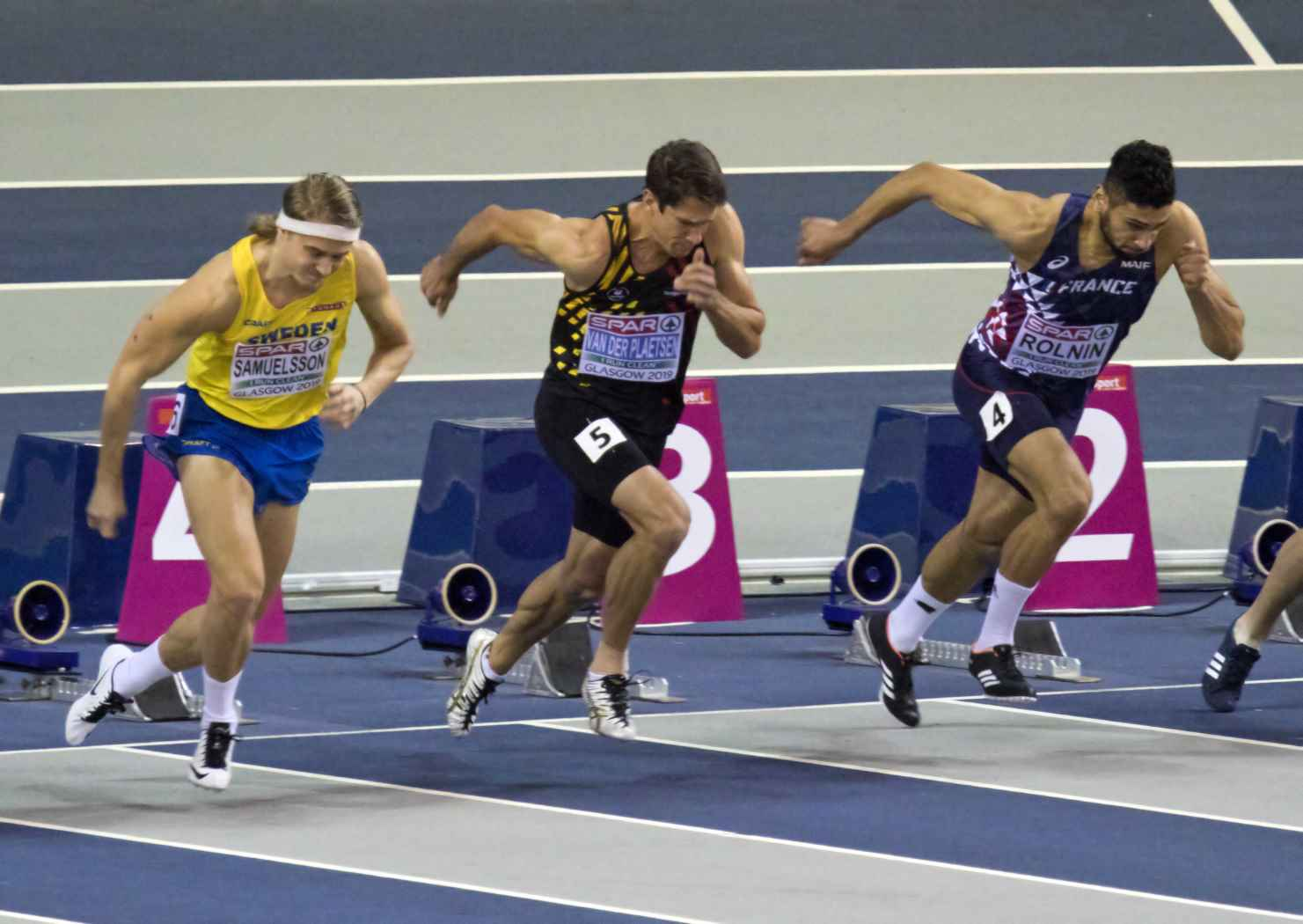 EKI20016 7k 60m van der plaetsen